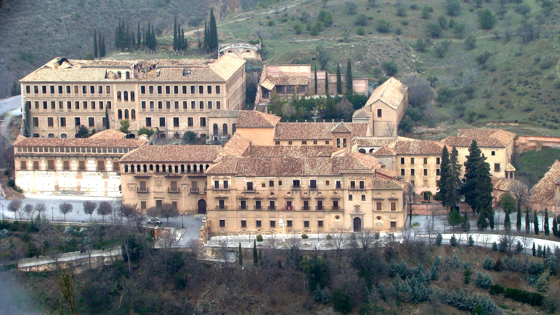 Abadía del Sacromonte (Granada) desde el Cerro del Sol